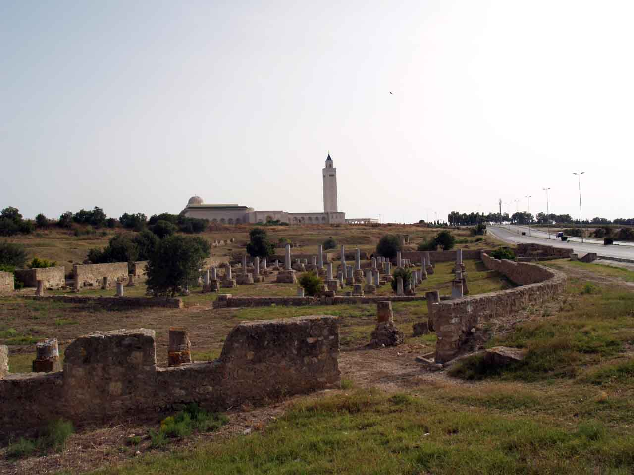 La mosquée El Abidine de Carthage et les ruines de Damous Karita Bertrand Bouret